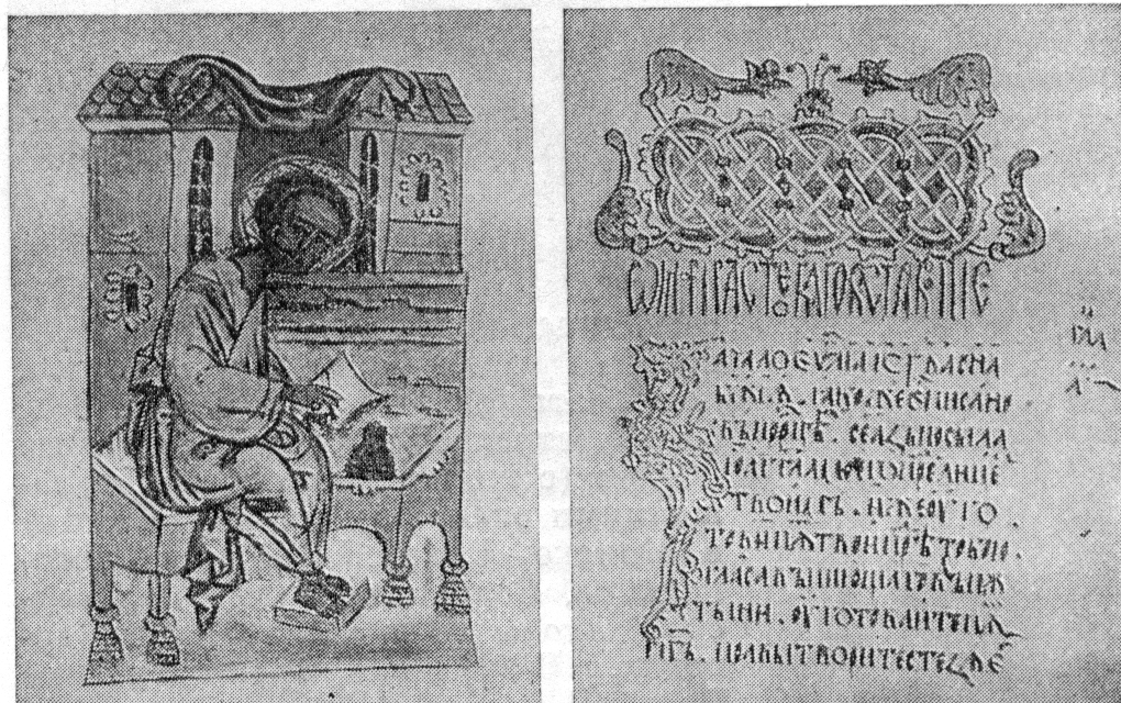 Разворот Шерешёвского Евангелия